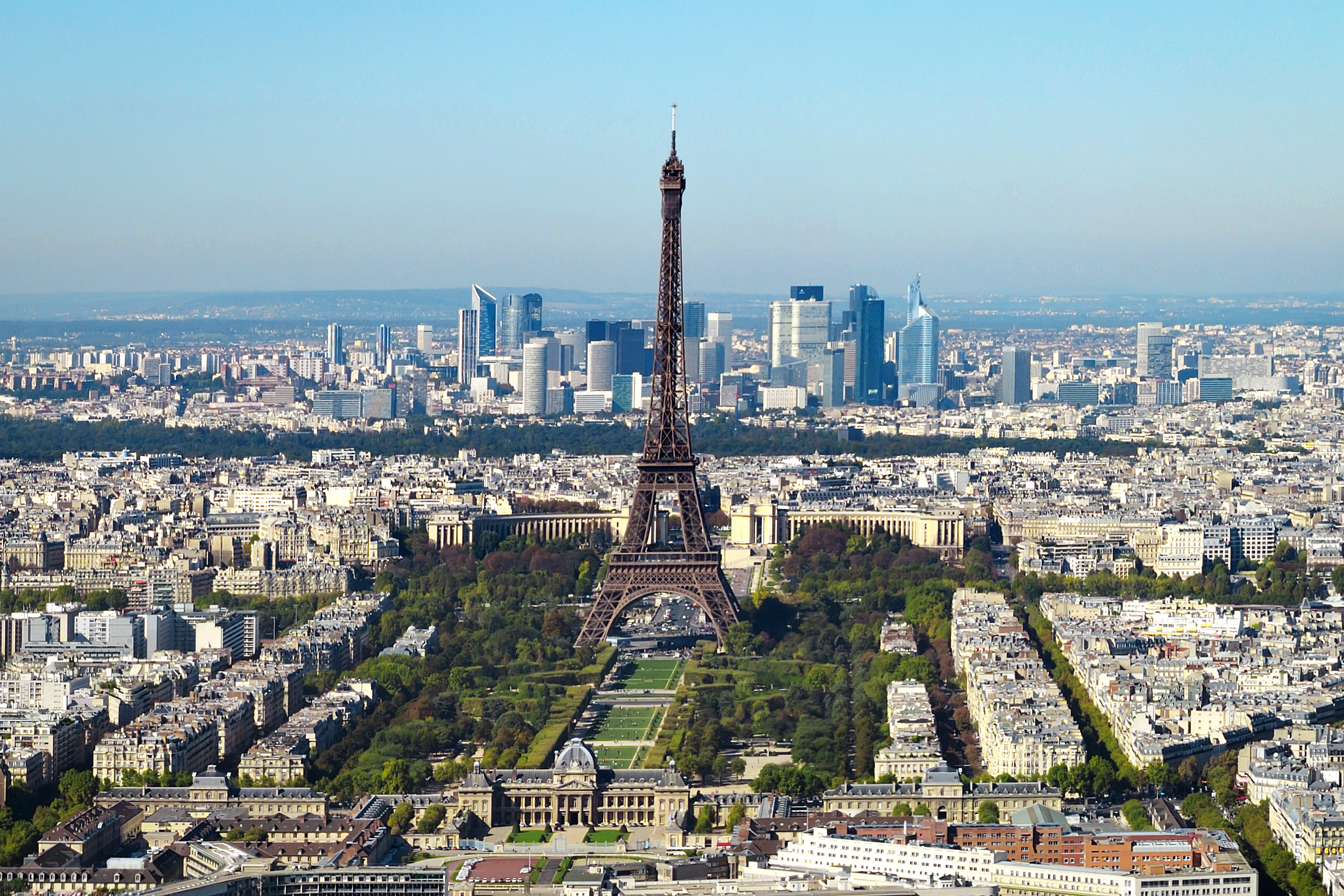 Vue de Paris centrée sur la tour Eiffel.